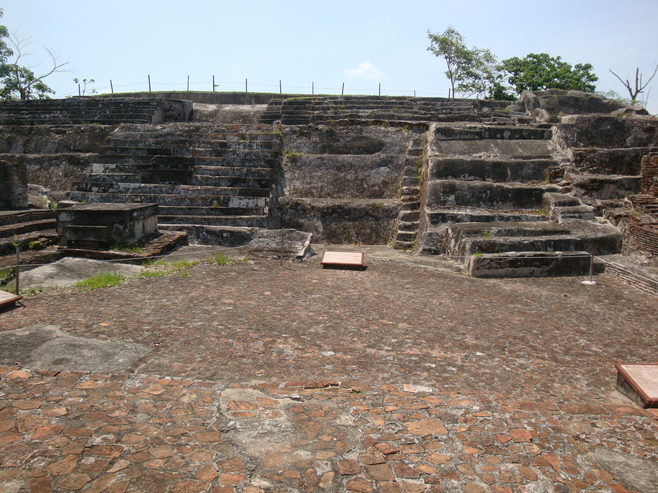 Estructura 3. Localizada en el interior de la "Gran Acrópolis" es la de mayor altura de dicho conjunto. Ciudad maya de Comalcalco, Tabasco, México.